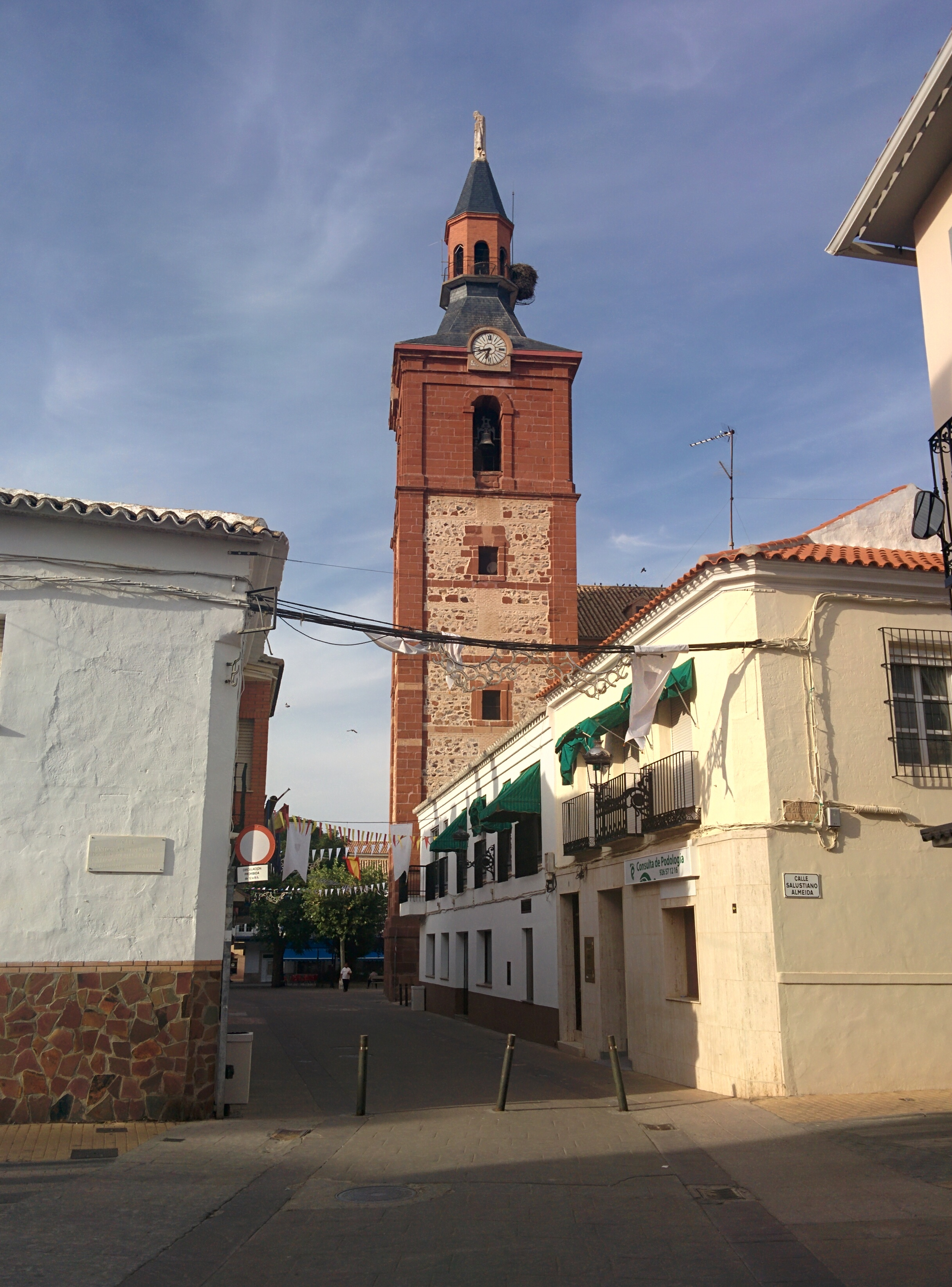 Iglesia de la Inmaculada Concepción (Herencia, Ciudad Real).